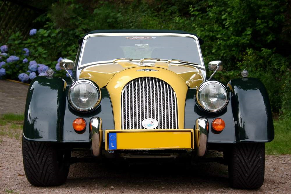 Morgan +8 Morgan